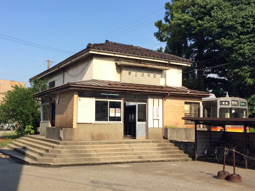 富山地方鉄道本線 東三日市駅 駅舎